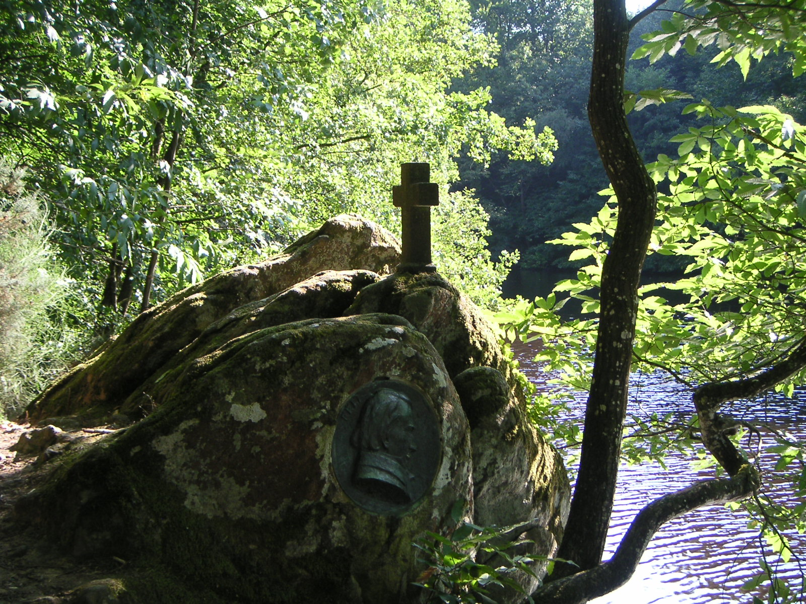 Croix et médaillon en hommage à Félicité Robert de Lamennais dans le bois de la Chesnaie à Saint-Pierre-de-Plesguen. Photo personnelle - TouN - libre de droit Prise le : 17 août 2005